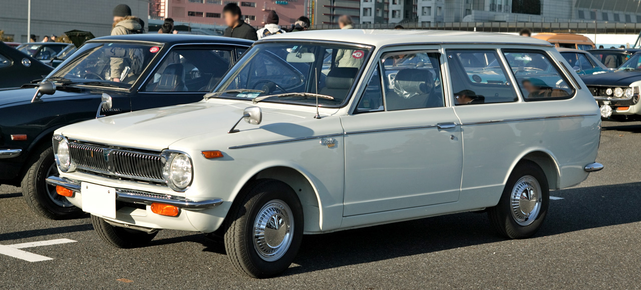 Toyota Corolla 2 door Van 1200 Deluxe ( KE18V-D )